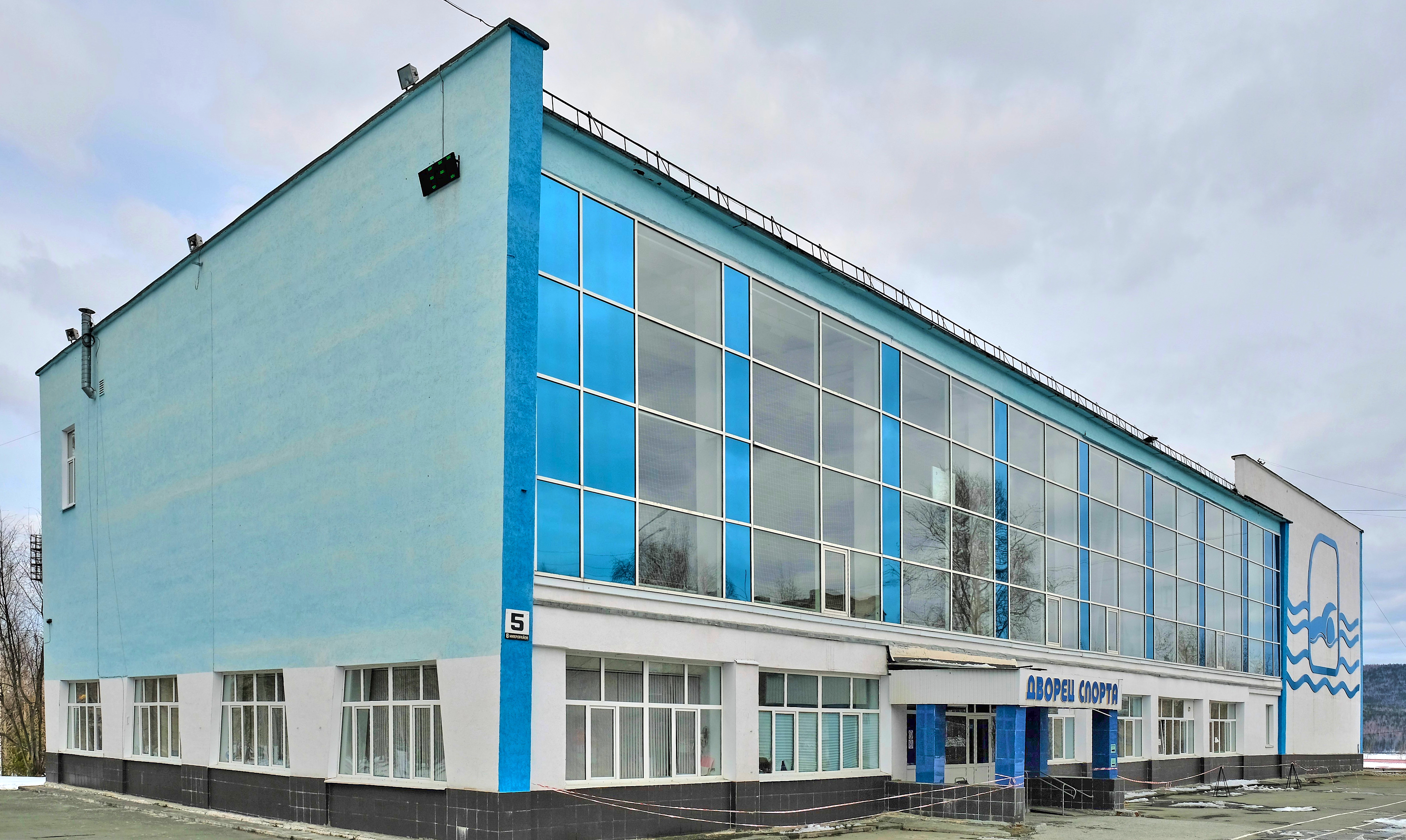 Дворец спорта в Качканаре